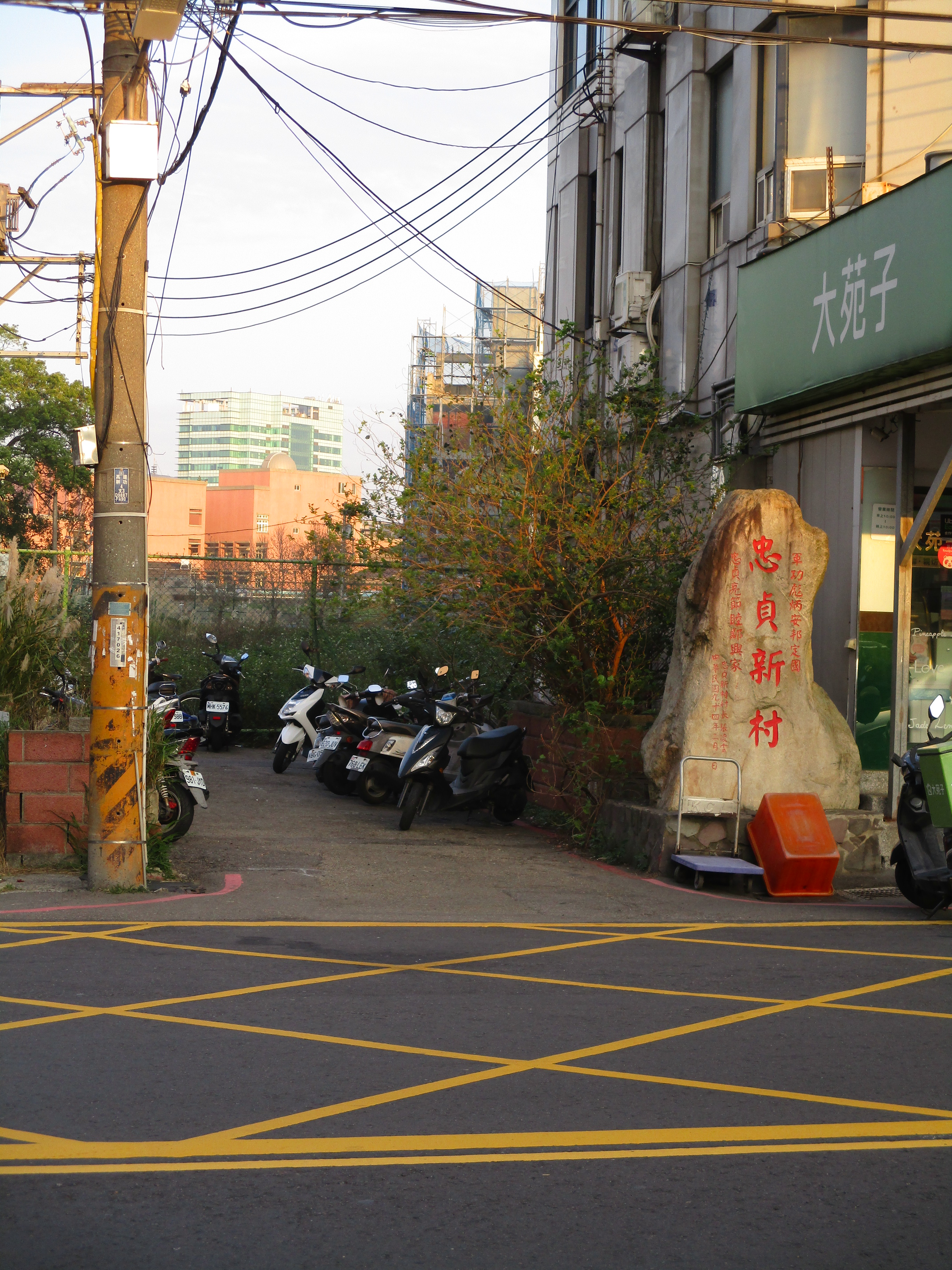 位於清大夜市內的忠貞新村界碑